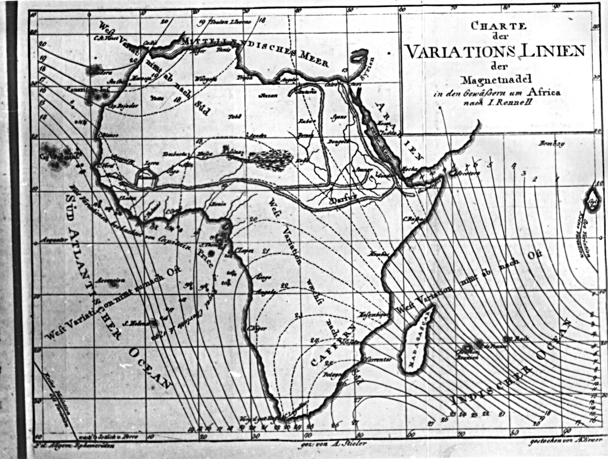 Stielerkarte in Allgemeinen Geographischen Ephemeriden